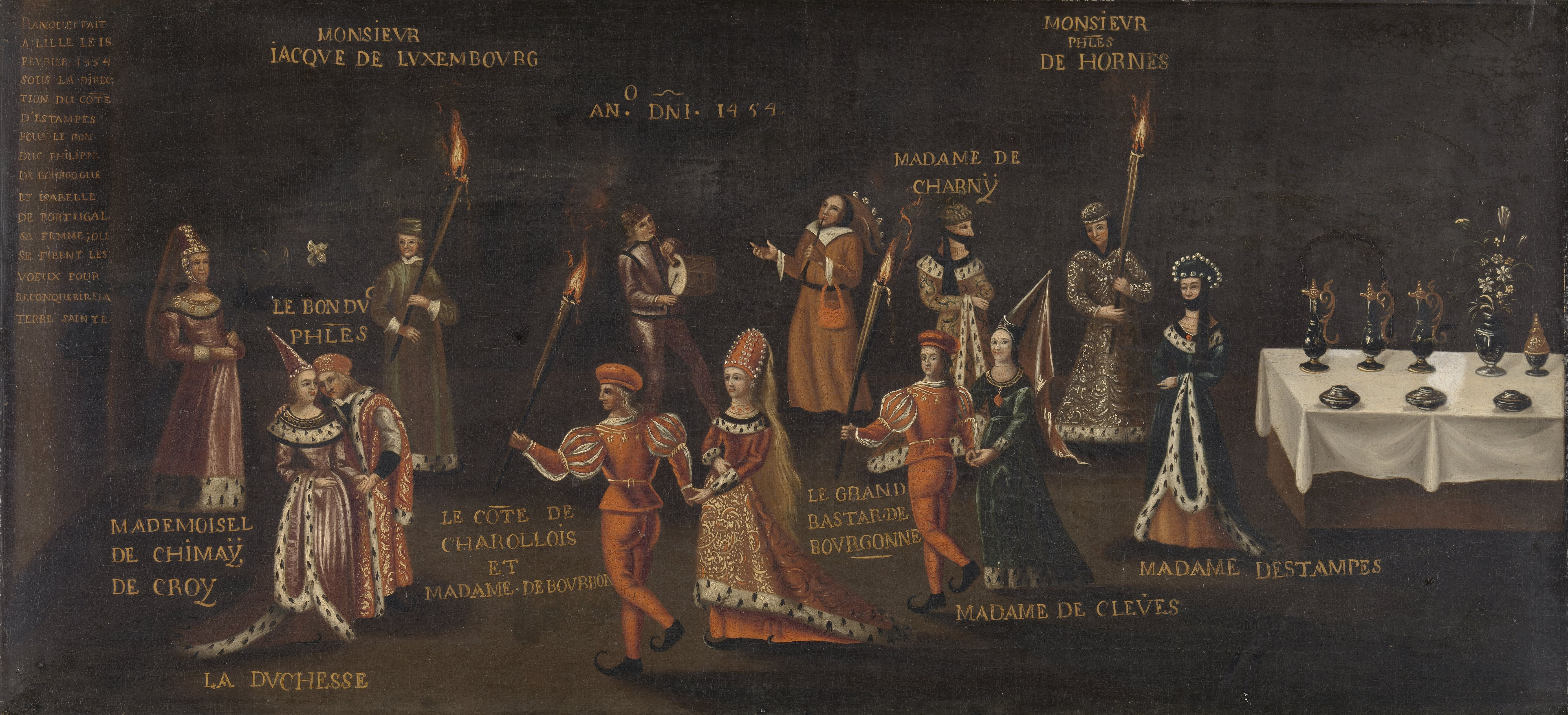 'Le voeu du faisan'. Philips de Goede en Isabella van Bourbon aanwezig op een banket gegeven in 1454 door Madame d'Estampes in het kasteel de Rihour te Rijssel ter gelegenheid van hun plechtige eedsaflegging om een kruistocht te maken om het Heilige Land te heroveren. Rechts een gedekte tafel, op de achtergrond twee muzikanten. De genodigden dragen brandende toortsen. Late kopie naar een onbekend origineel